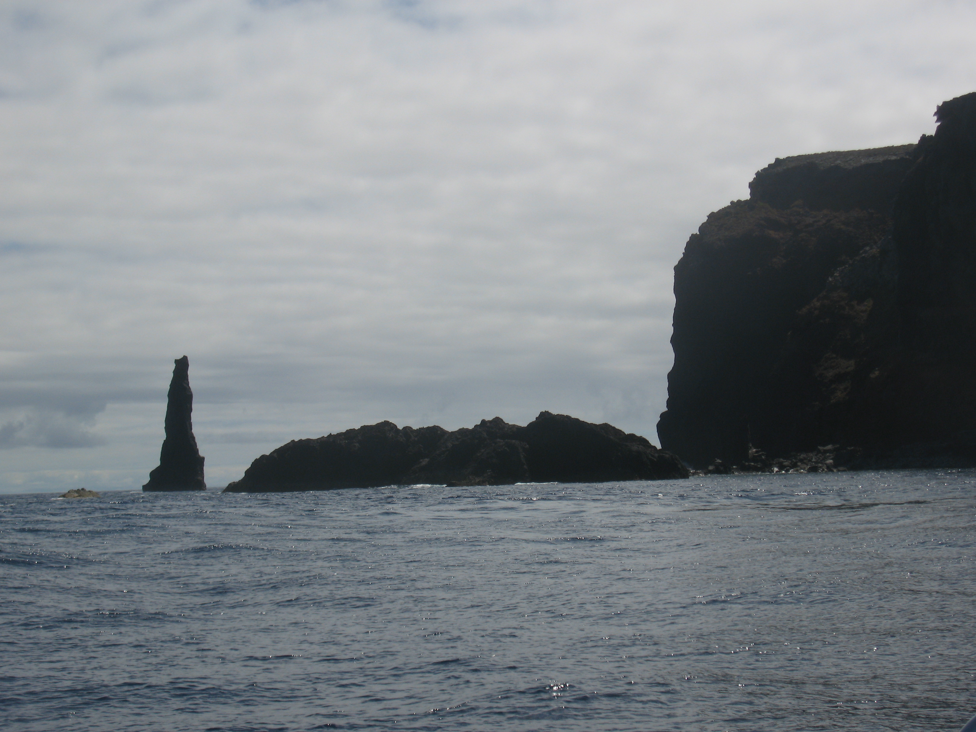 Zicht op het noordelijke eiland Ilhas_Desertas